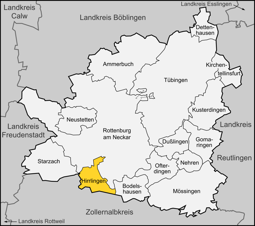 Karte der Gemeinde Hirrlingen im Landkreis Tübingen